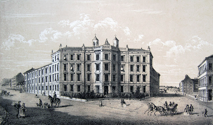 Wien-Alsergrund, Bürger-Versorgungshaus in der Alservorstadt (eröffnet 1860, abgebrochen 1929/30; heute: Arne-Carlsson-Park)